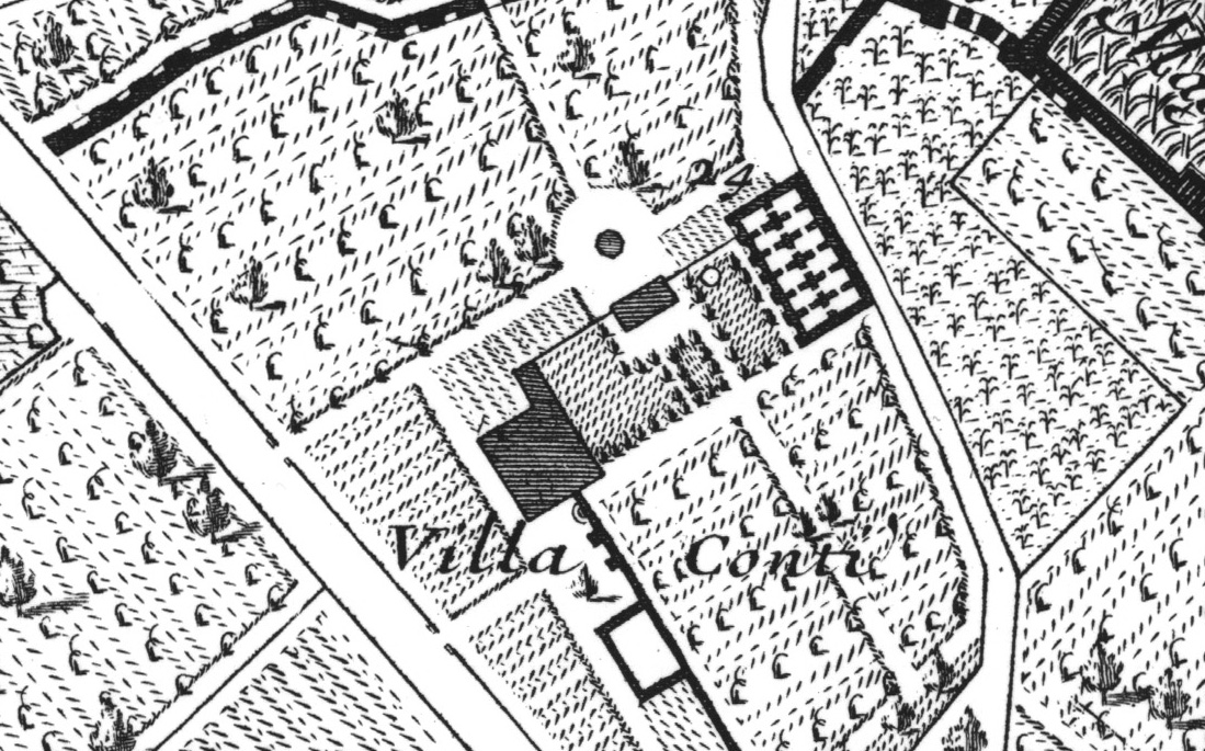 Cisterne delle Terme Eleniane presso la villa Conti all'Esquilino (Nuova Topografia di Roma di G. Nolli, 1748)